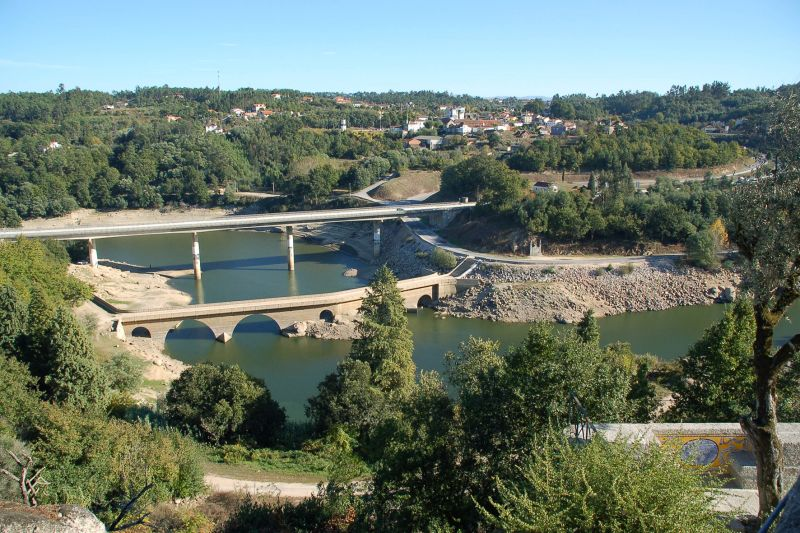 Santa Comba Dão - Rio Dão